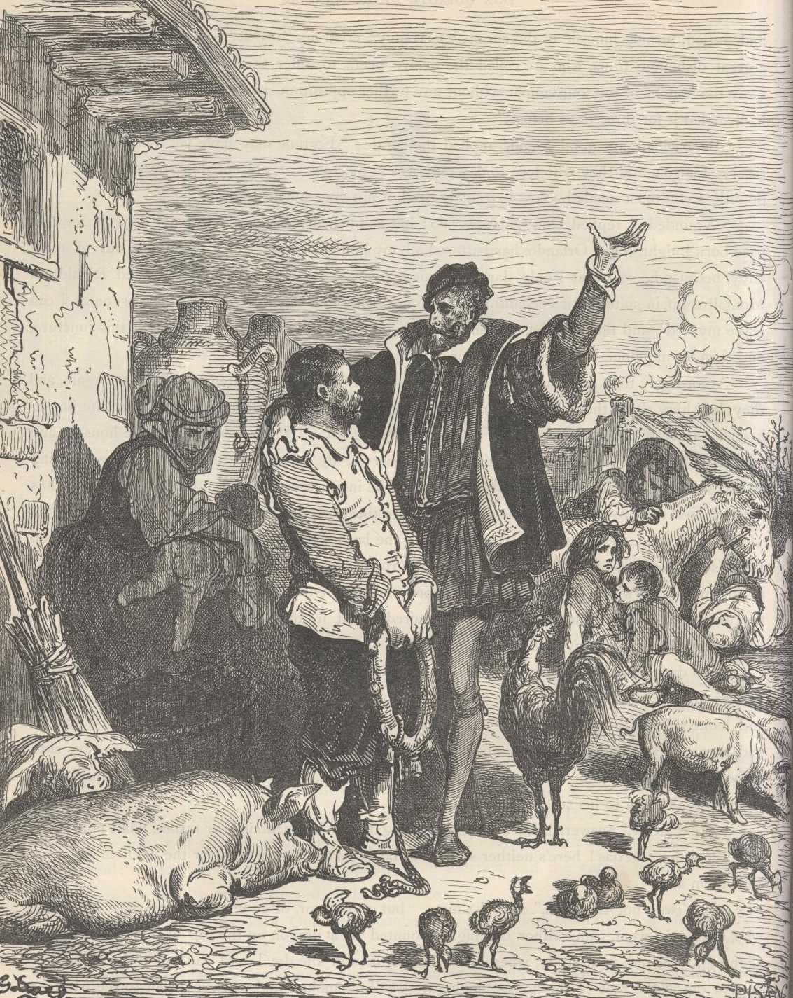 "D. Quixote convence Sancho Pança" (1863), iIustração por Gustave Doré para “Don Quixote“ de Miguel de Cervantes.